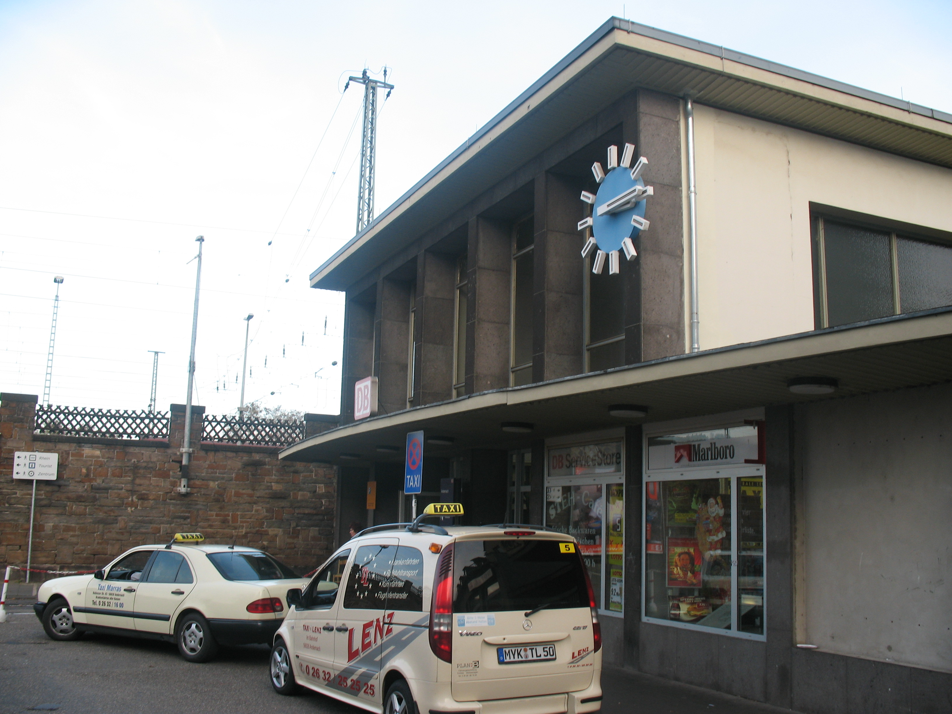 Bahnhof Andernach